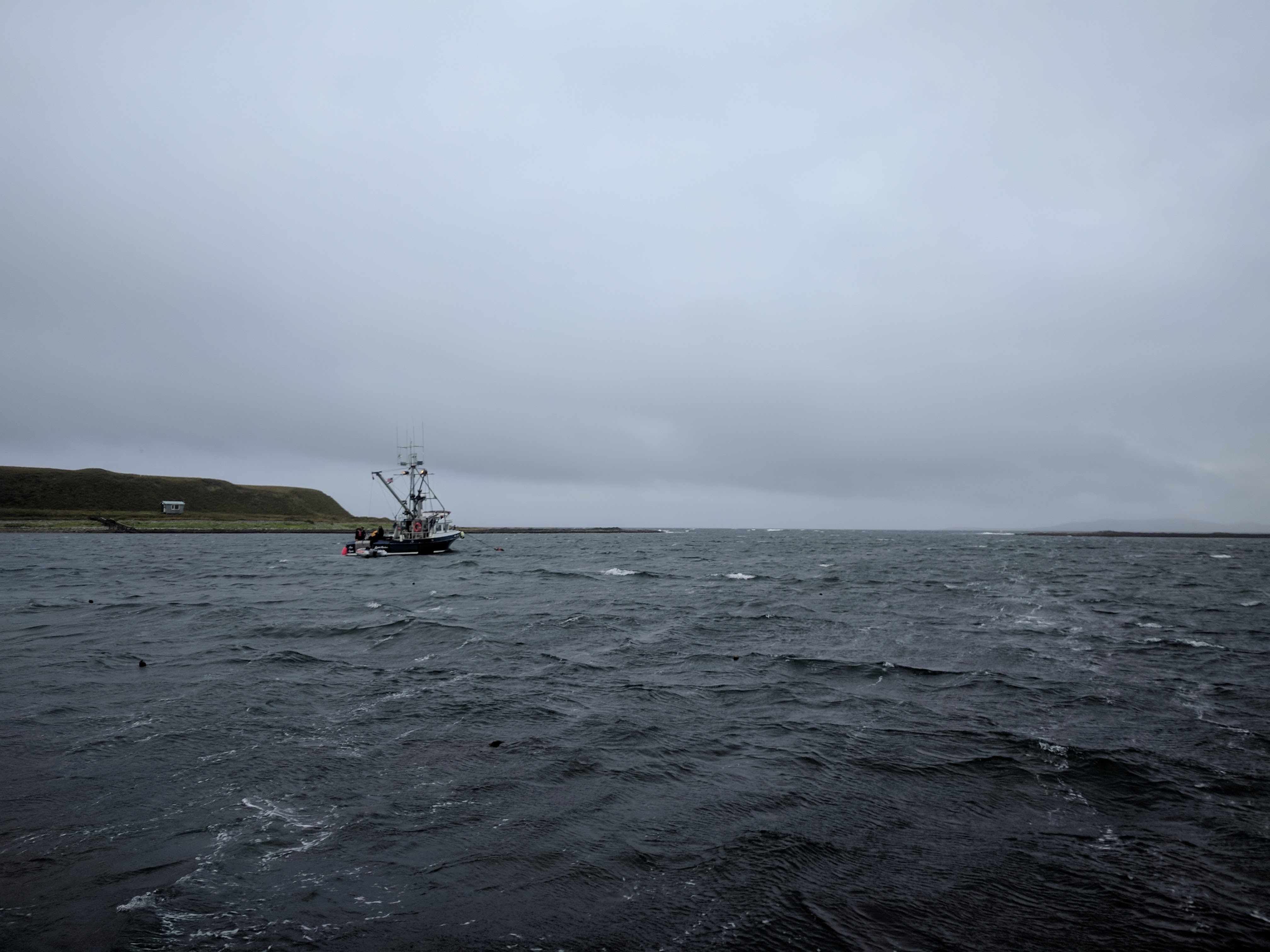 Снабжение Никольского по морю осуществляется разгрузкой судов на баржи и маломерные суда